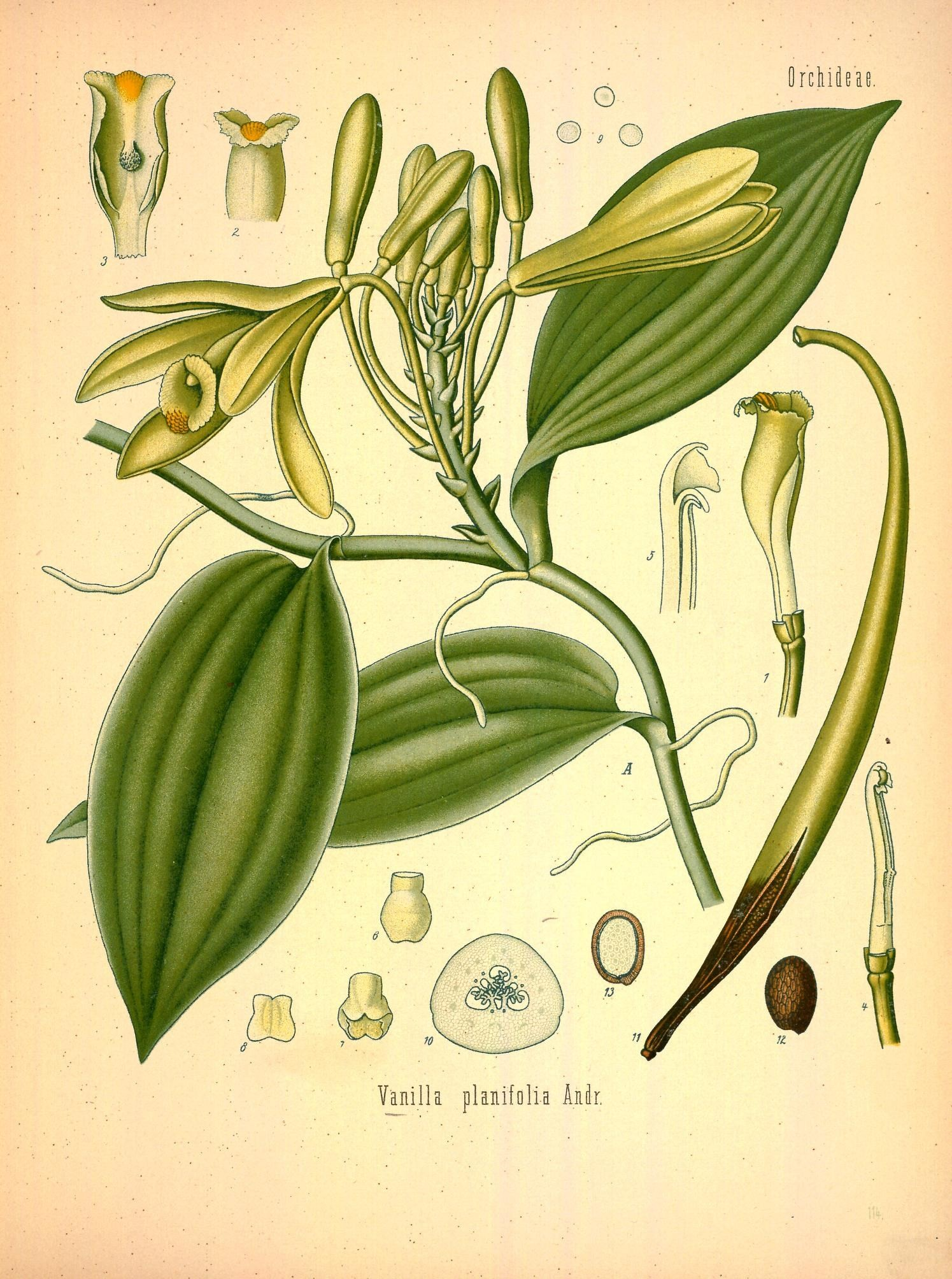 Echte Vanille. A Blühender Zweig, nat. Grösse; 1 Lippe vergrössert; 2 und 3 Oberer Theil der Lippe von der Rück- und Vorderseite, desgl.; 4 Griffelsäule, desgl.; 5 Oberer Theil derselben im Längsschnitt, desgl.; 6 fruchtbares Staubgefäss von aussen, noch nicht geöffnet, desgl.; 7 desselbe an der Spitze aufgesprungen, desgl.; 9 Pollen, desgl.; 10 Fruchtknoten im Querschnitt, desgl.; 11 Frucht, nat. Grösse; 12 Same, vergrössert; 13 derselbe zerschnitten, desgl.